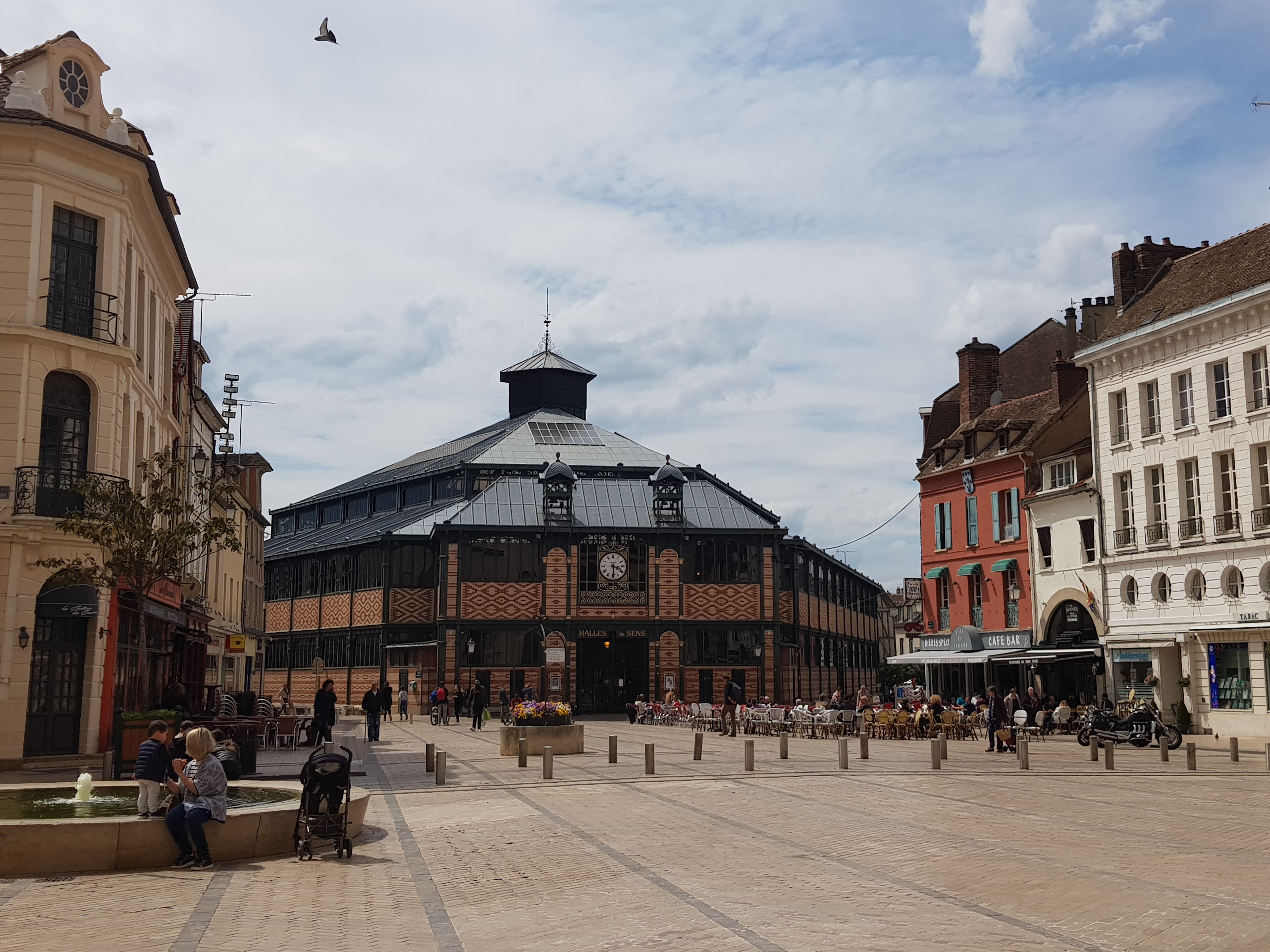 Les halles du marché de Sens, rénovées en 2015.